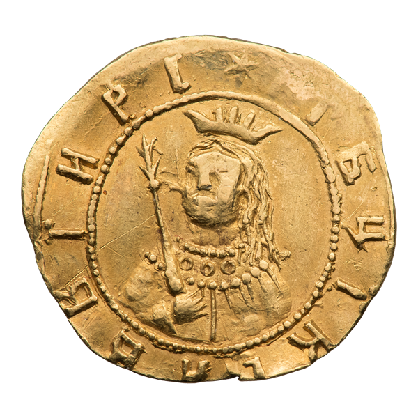 Угорский 1692 г. (аверс). ГМ 8.I.8—10.I.10; Биткин II 92.5.В. Поясной портрет царевны Софьи, слегка влево. В правой руке скипетр. Круговая надпись: *Ï Г Б Ц Ï К С А В В Ï И Р С (И ГОСУДАРЫНЯ БЛАГОВЕРНАЯ ЦАРЕВНА И КНЯЖНА СОФЬЯ АЛЕКСЕЕВНА ВСЕЯ ВЕЛИКАЯ И ИНЫХ РОССИИ САМОДЕРЖЦЫ)